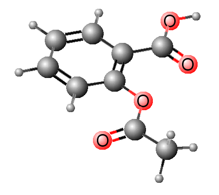 Prostorová model molekuly kyseliny acetylsalicylová